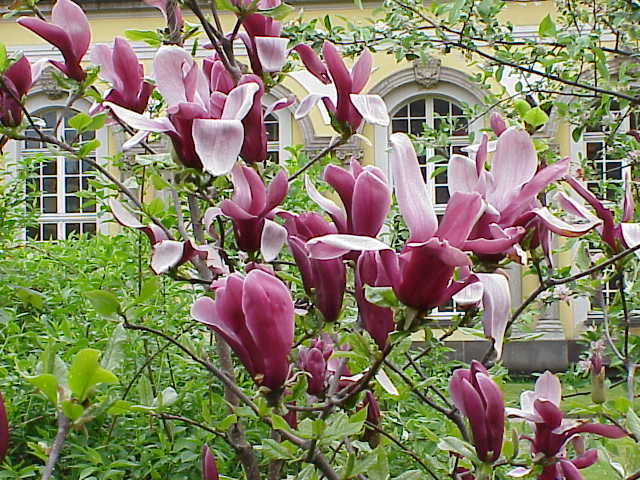 Magnolia liliiflora, Family: Magnoliaceae, Image no. 3